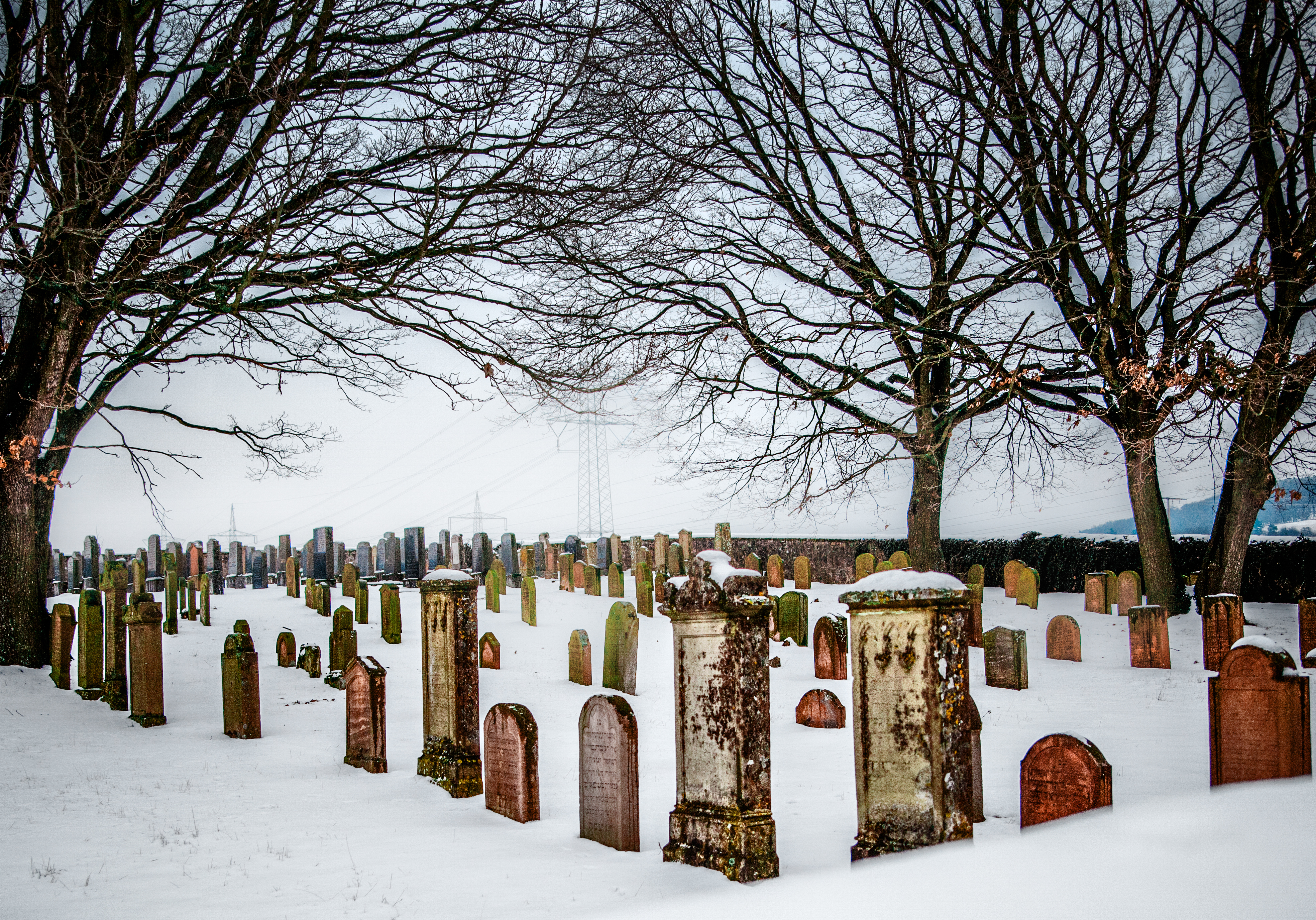 Jüdischer Friedhof in Hörstein im Winter 2013/14